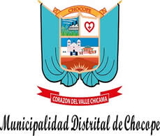 Escudo de la Ciudad de Chocope